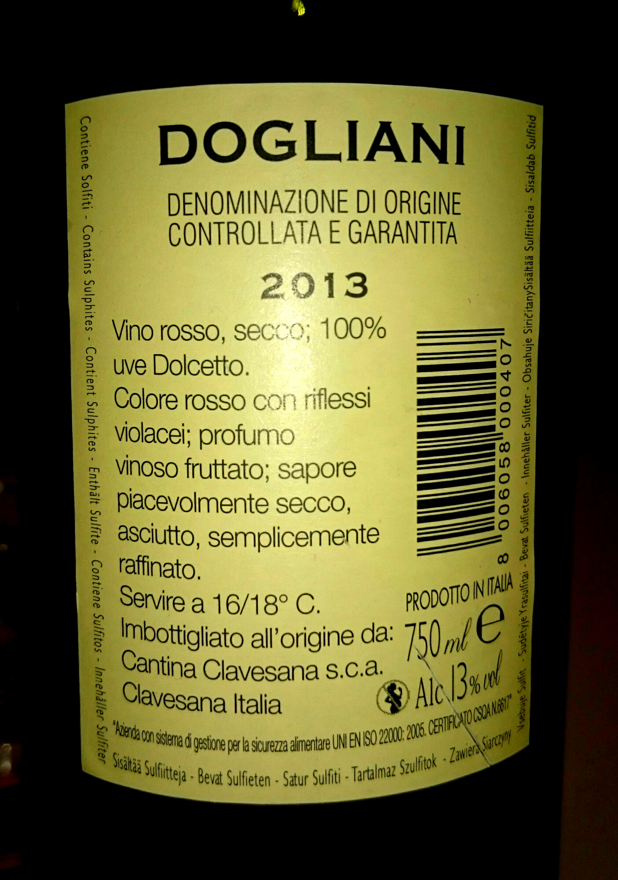 una bottiglia di Dogliani DOCG superiore (vol 13 %) imbottigliata all'origine, ovvero il vigneto che lo produce è della stessa cantina che lo imbottiglia.